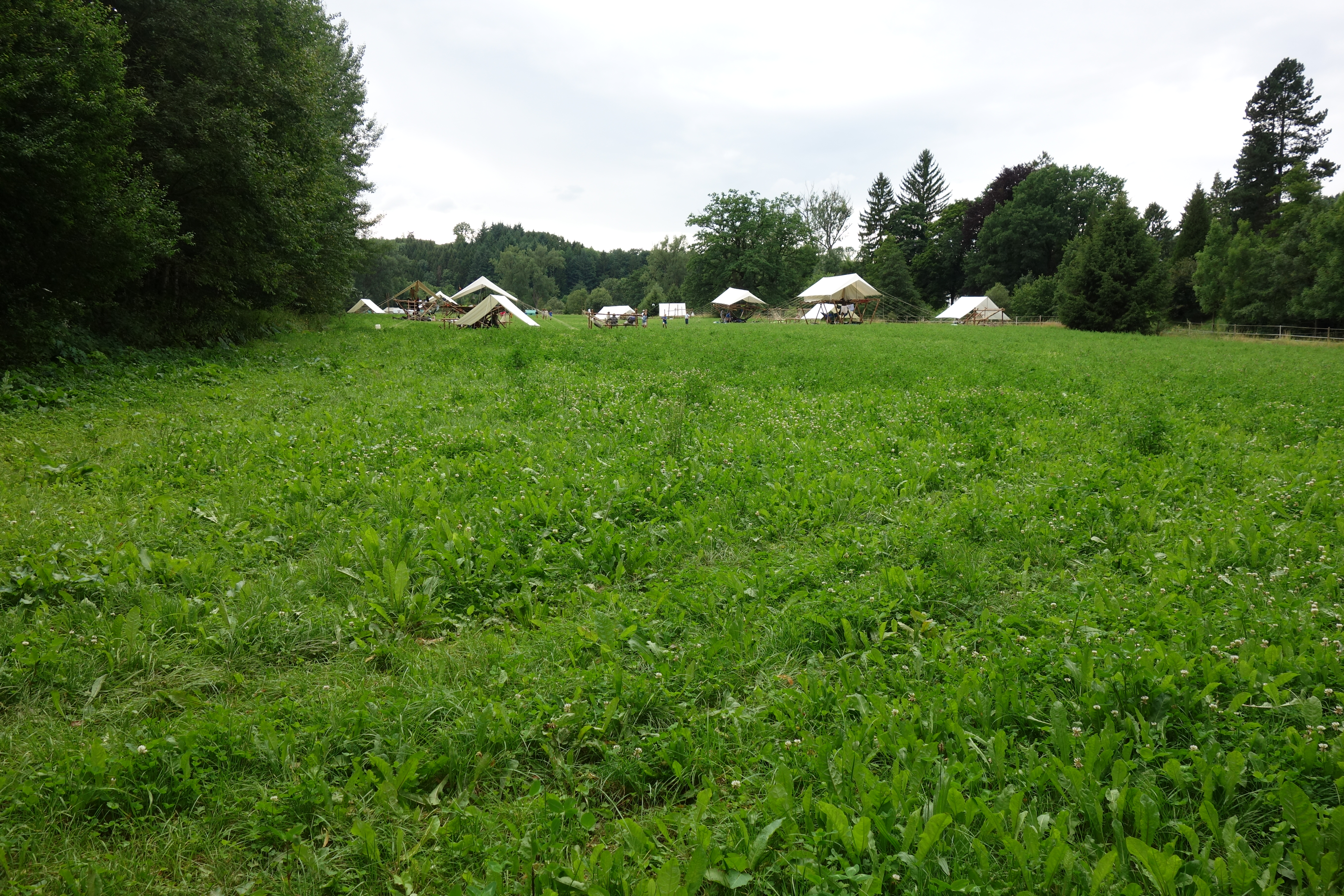 Landschaftsschutzgebiet Ruhrtal südlich Stockhausen 1.JPG mit Zelten eines Pfandfinderlagers